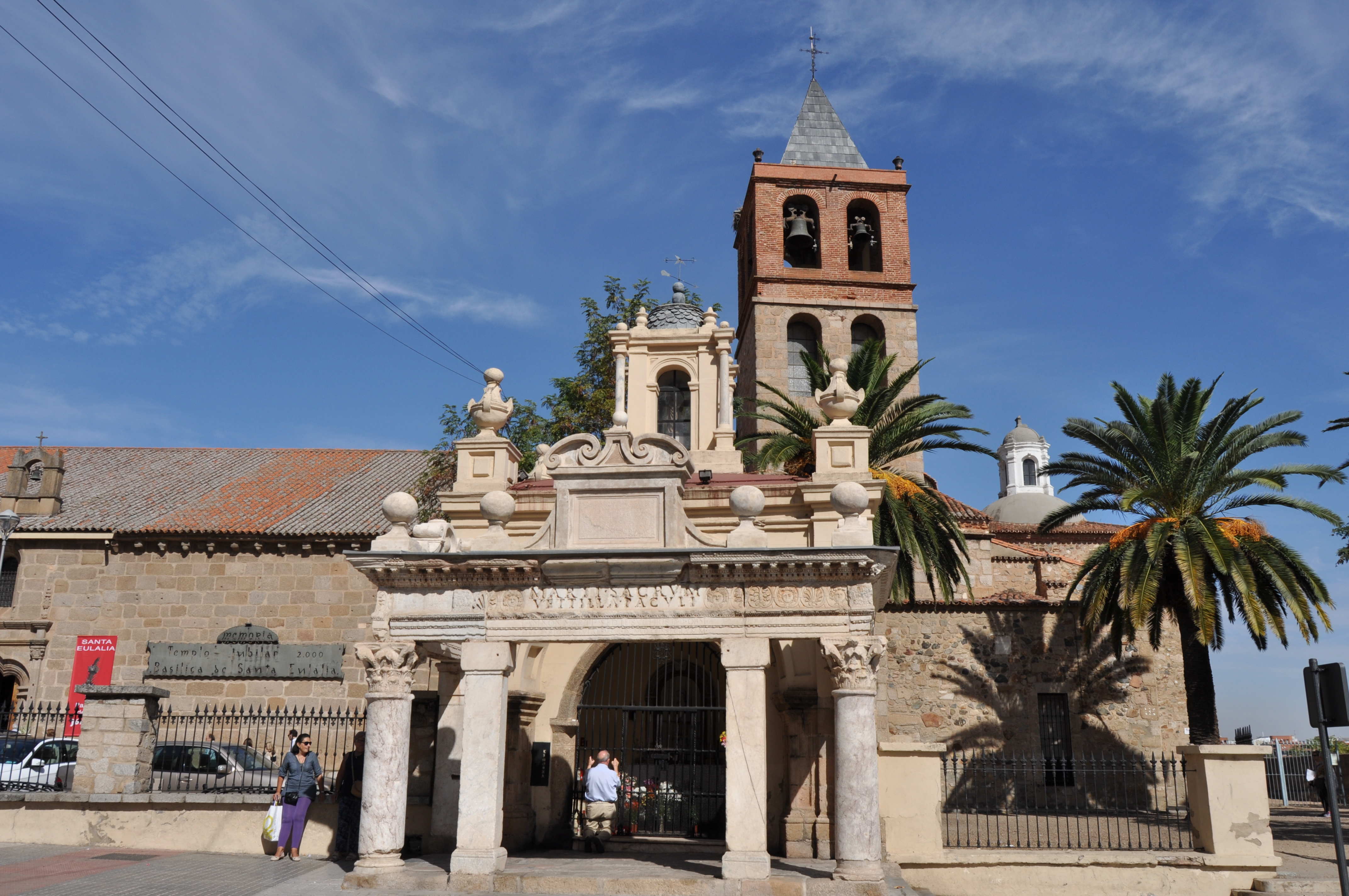 Merida - 054